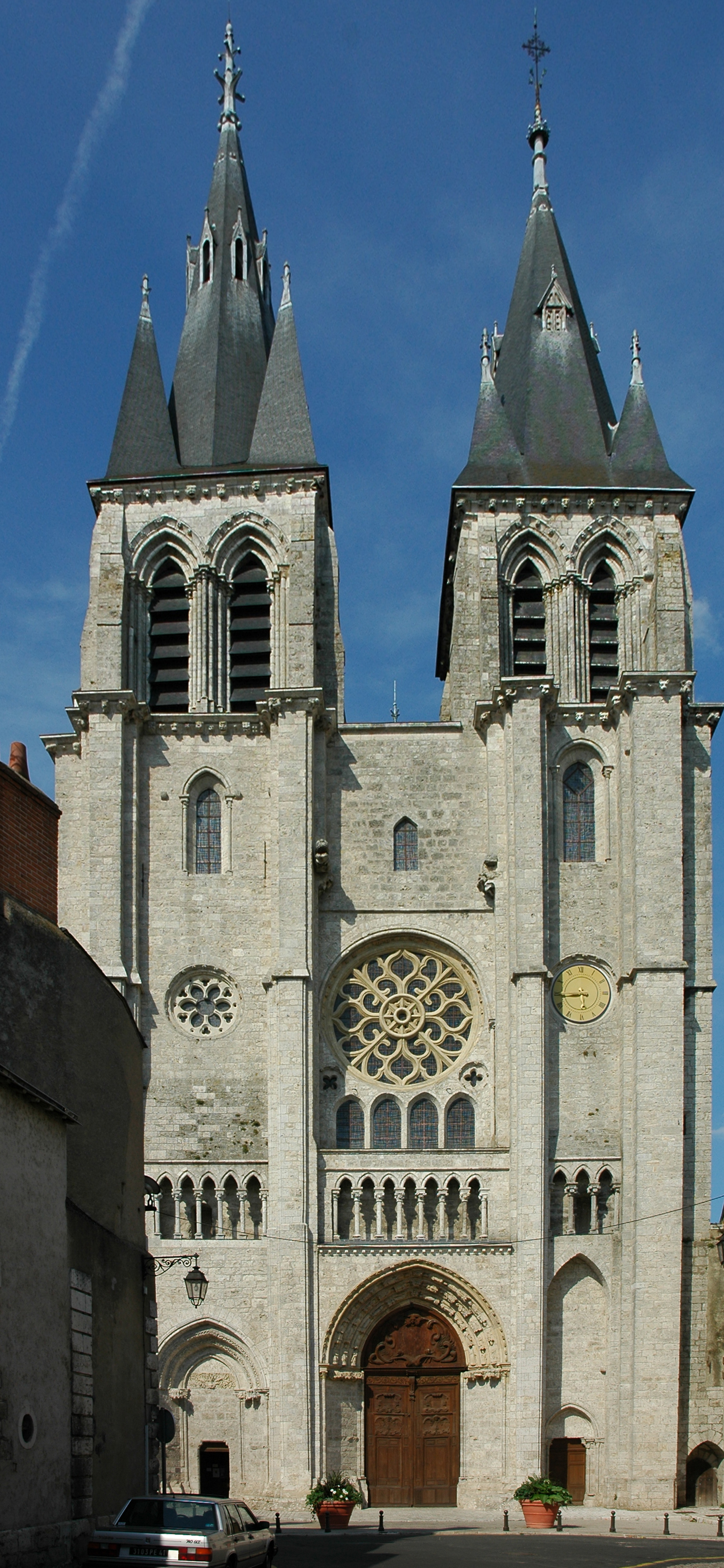 France Loir-et-Cher Blois Eglise Saint-Nicolas Photographie prise par Patrick GIRAUD